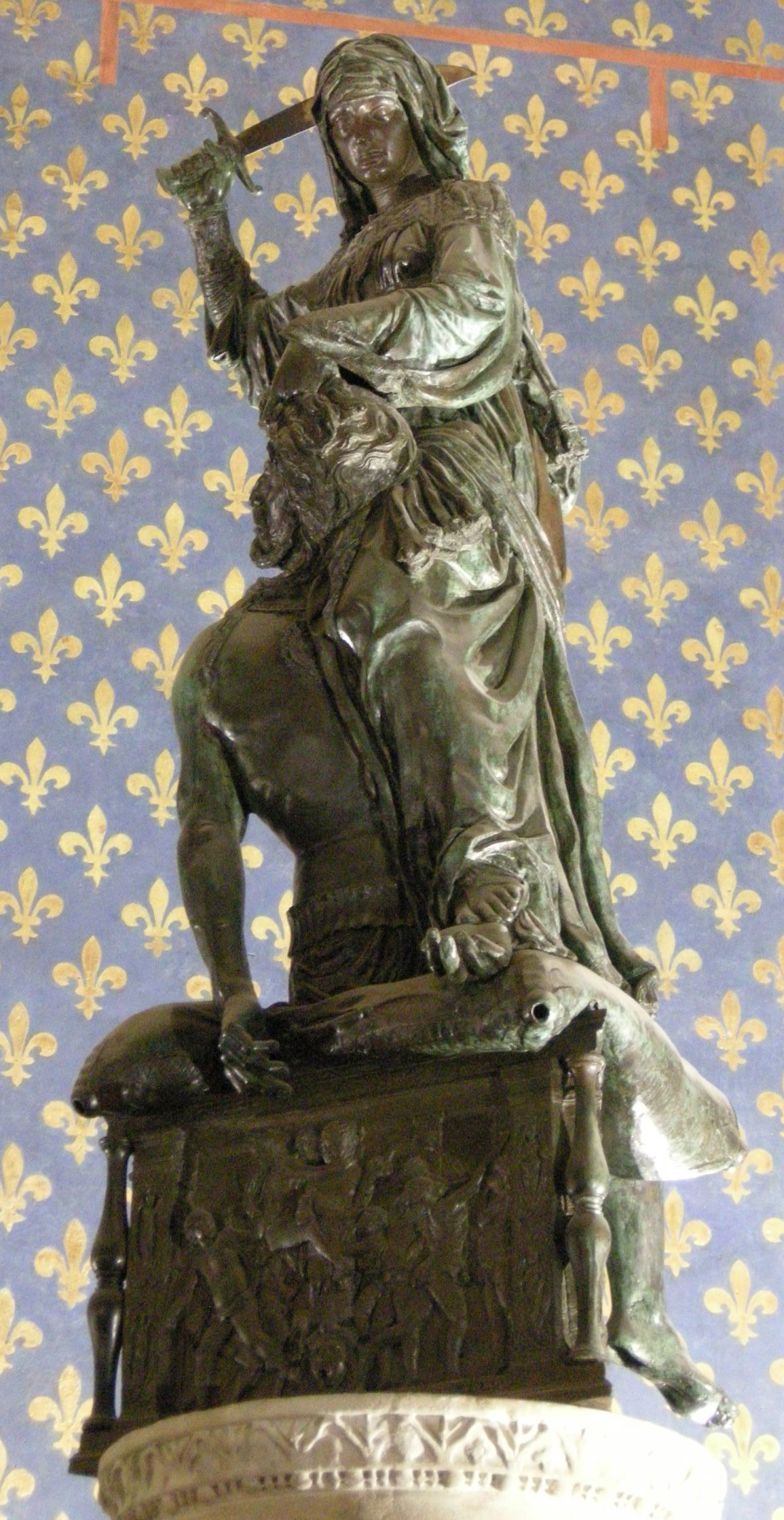 Giuditta di donatello